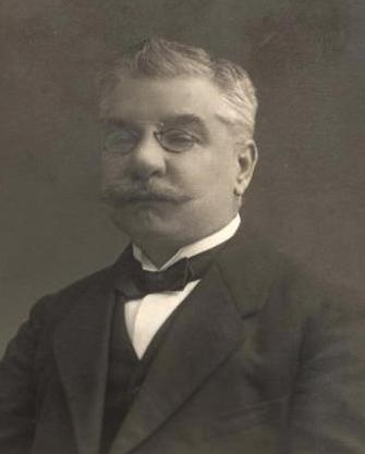 Historik, vydavatel RicharD Hrdlička (1868-1967)